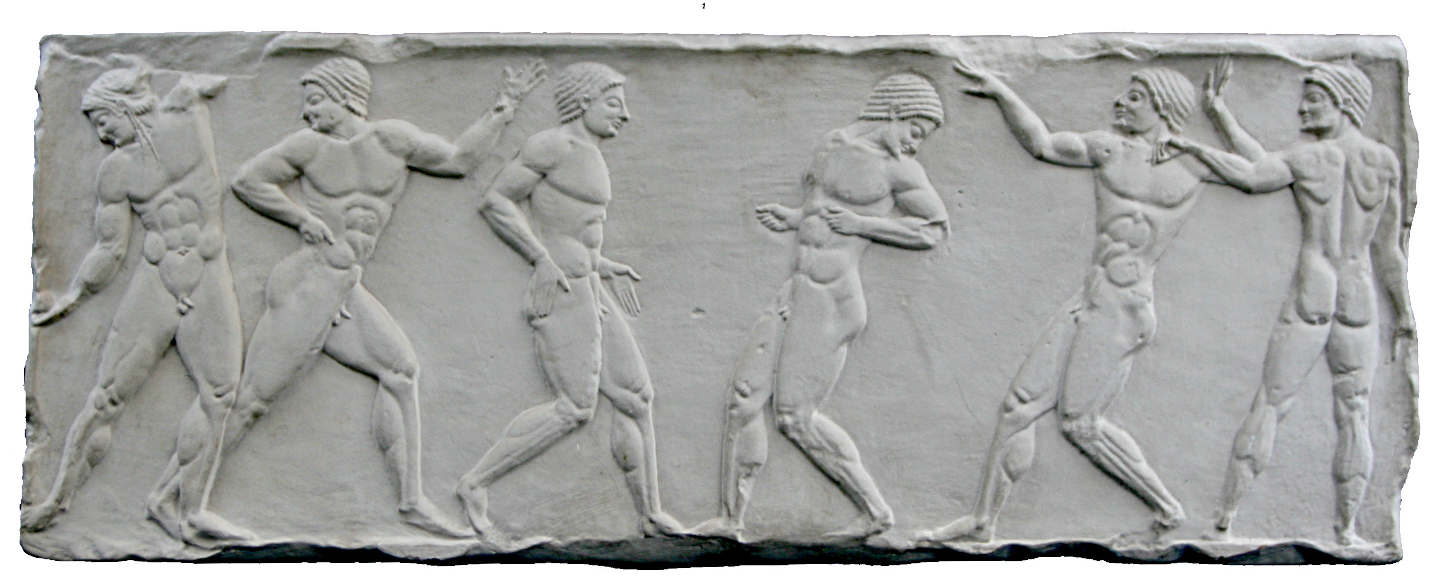 Abguss eine Reliefs mit zwei Mannschaften beim Ballspiel. Der Spieler am linken Bildrand wirft den Ball, die Mannschaft rechts steht zur ABwehr bereit. Original Athen, Nationalmuseum. ca. 500 v.Chr Photographed by me in Glyptothek Munich